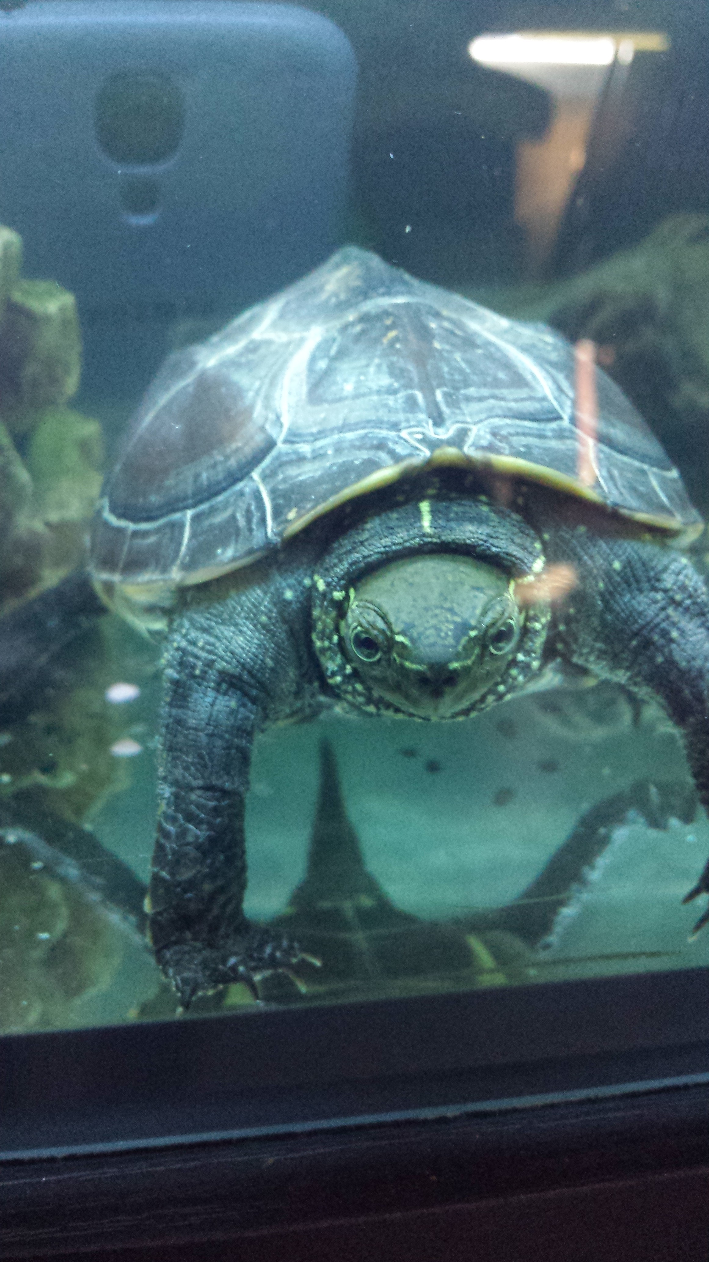 Trekjølskilpadde